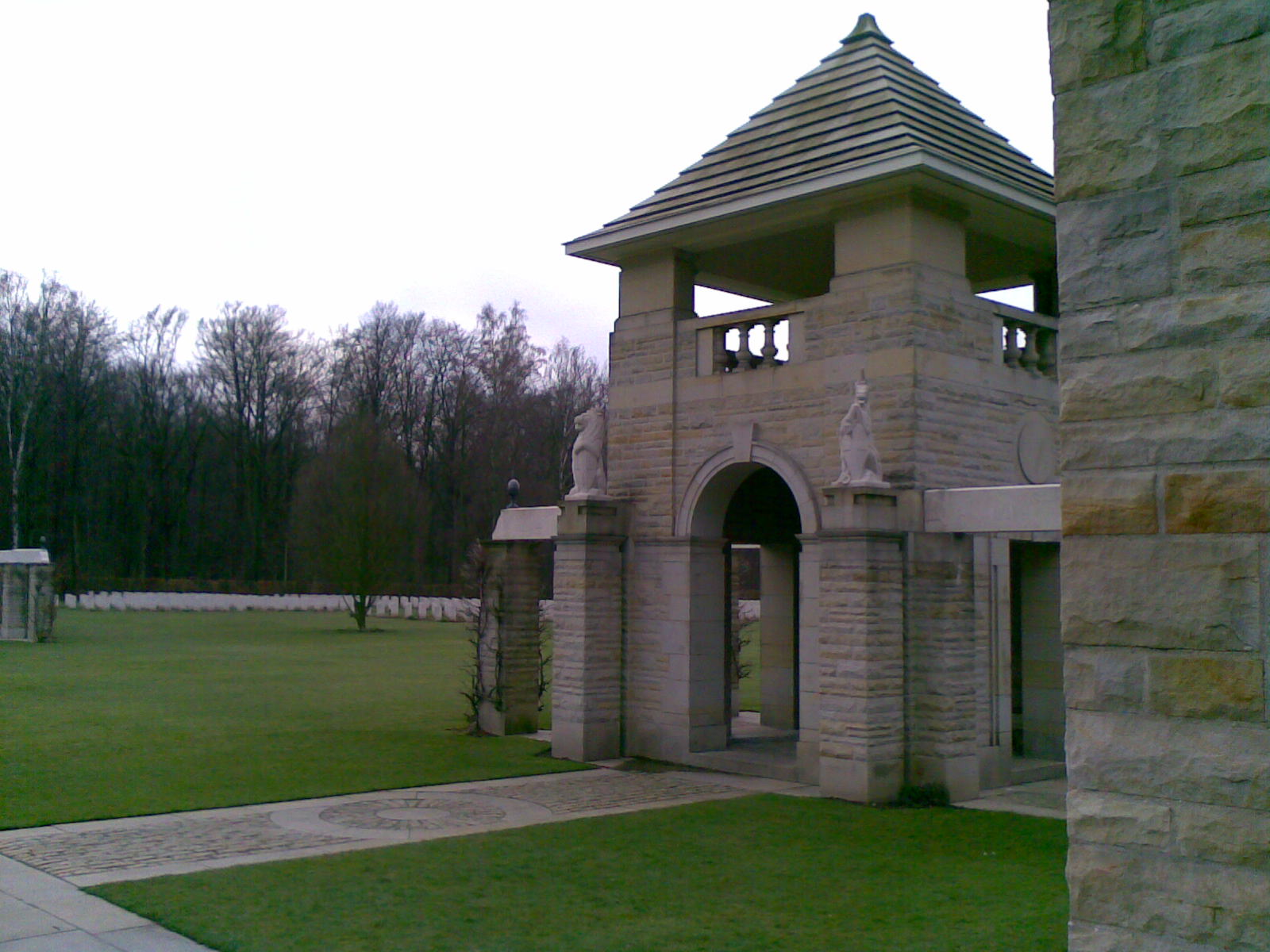 Britischer Ehrenfriedhof Reichswald, Turm im maurischen Stil